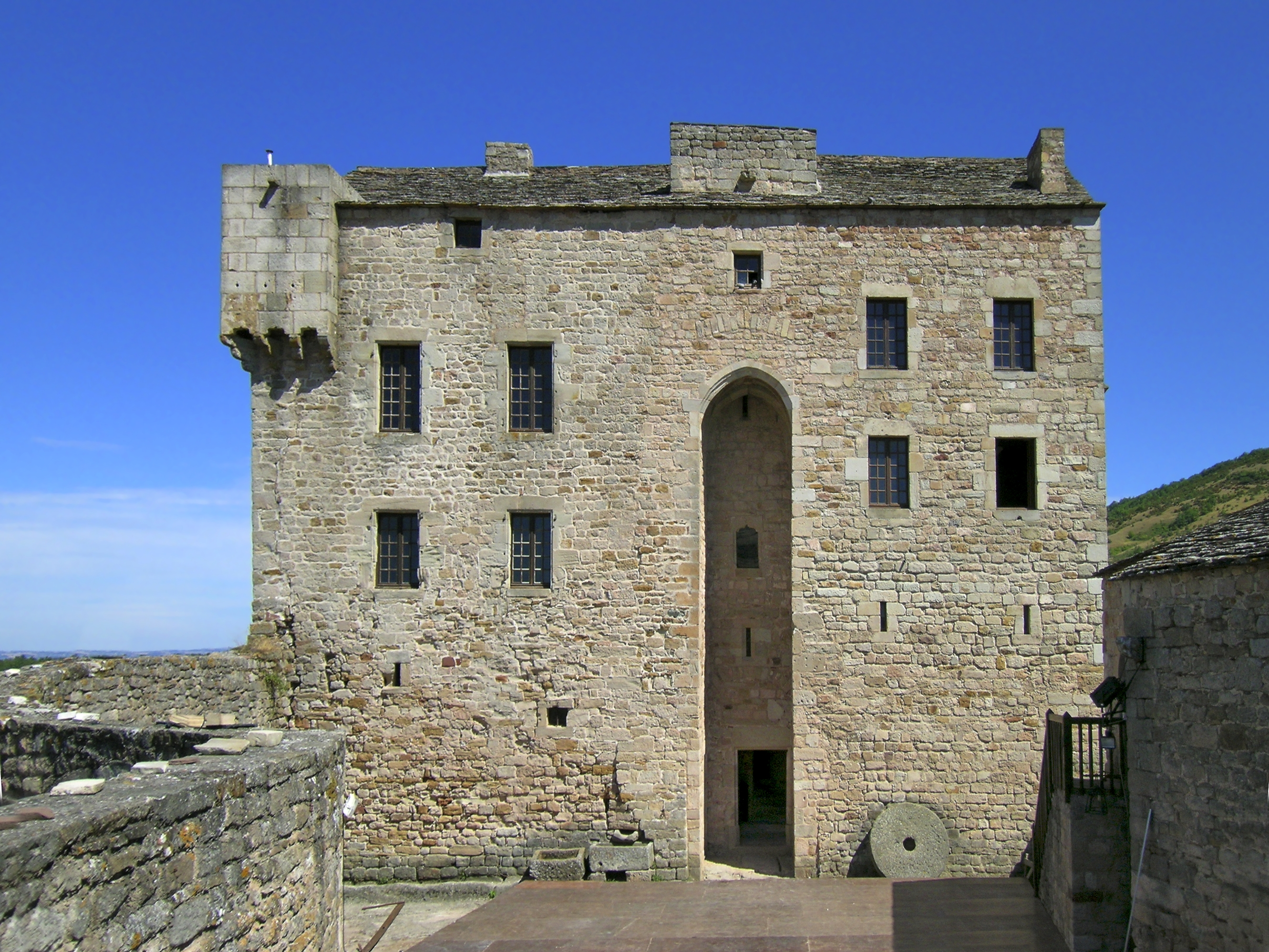 Château de Montaigut à Gissac (Aveyron, Midi-Pyrénées, France).